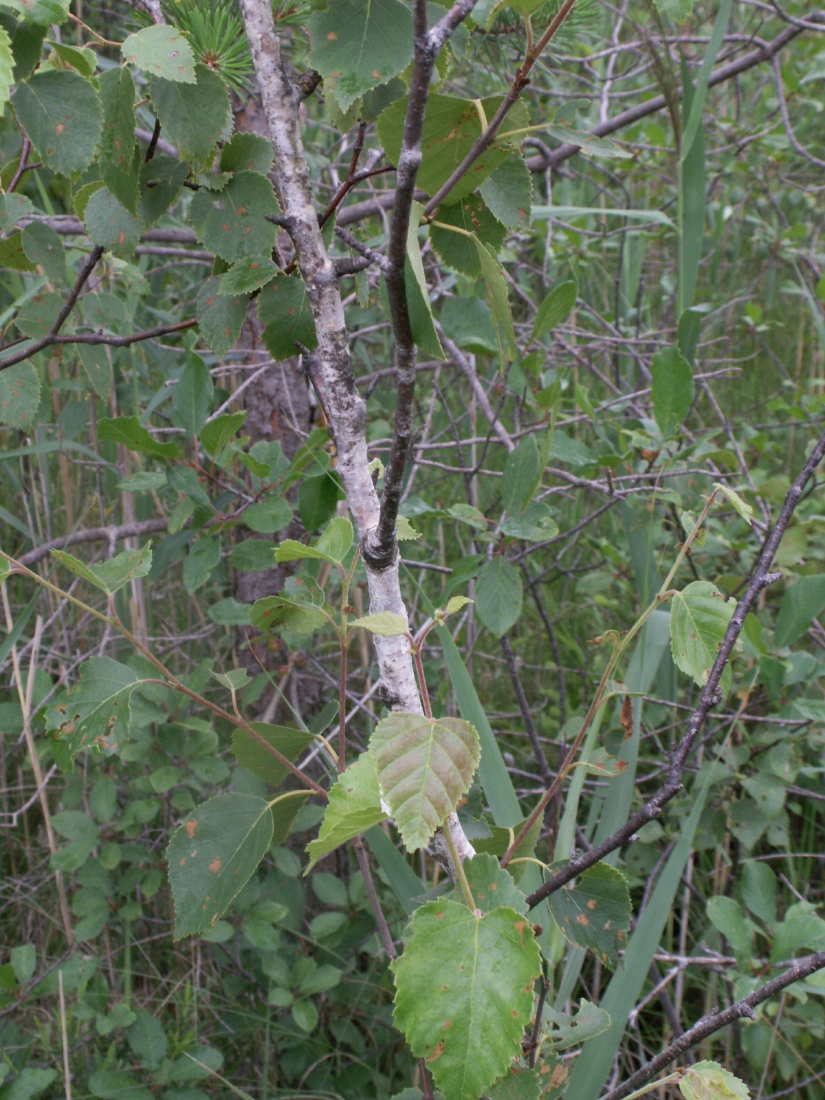 Betula pubescens Stamm + Torfmoos + Fieberklee